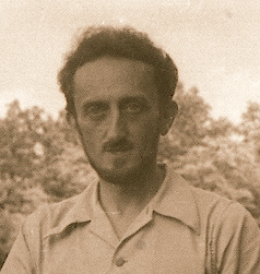 60's